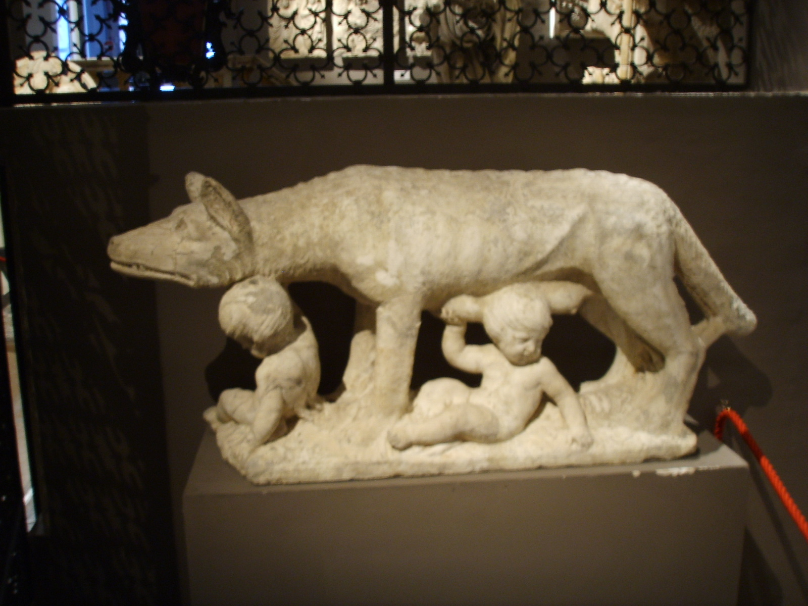 Sculpture of la Lupa, Opera del Duomo Museum in Siena, Italy